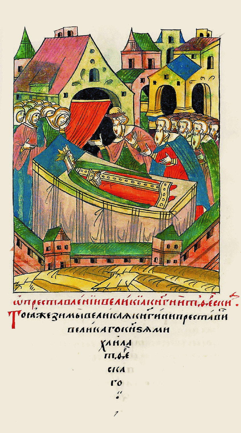 О кончине великой княгини Тверской. В ту же зиму скончалась ве- ликая княгиня, великого князя Твер- ского Михаила.